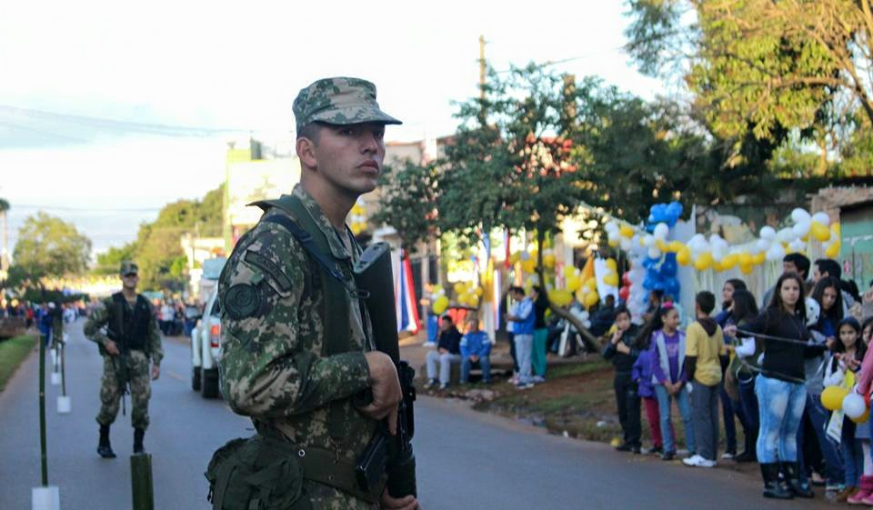 Soldados del Ejército paraguayo custodiando uno de los sectores por donde pasara más tarde el papamóvil, en San Lorenzo, Paraguay. Sábado 11 de julio de 2015.